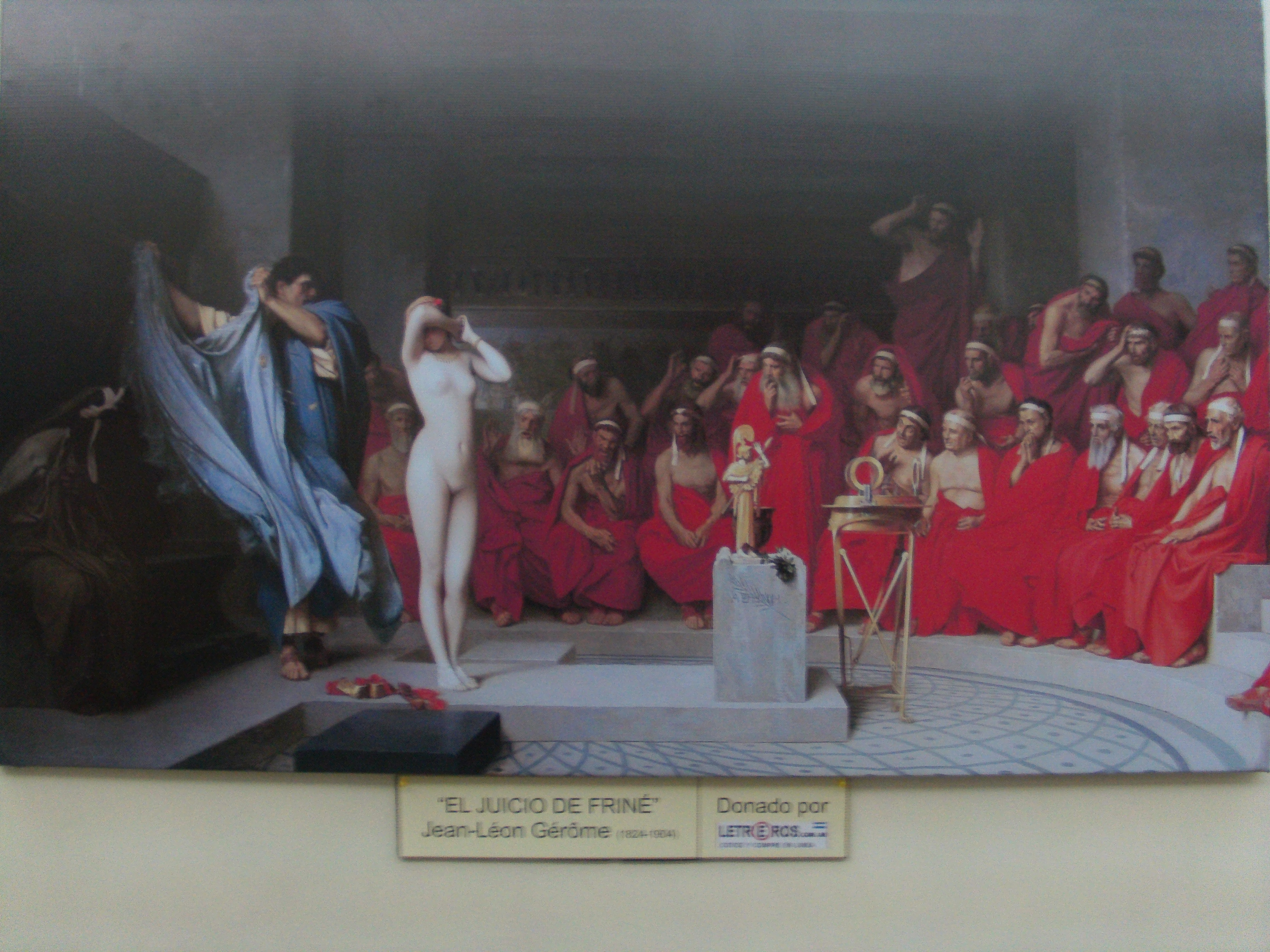 El Juicio de Friné es uno de los cuadros más conocidos dentro del ámbito legal mundial.